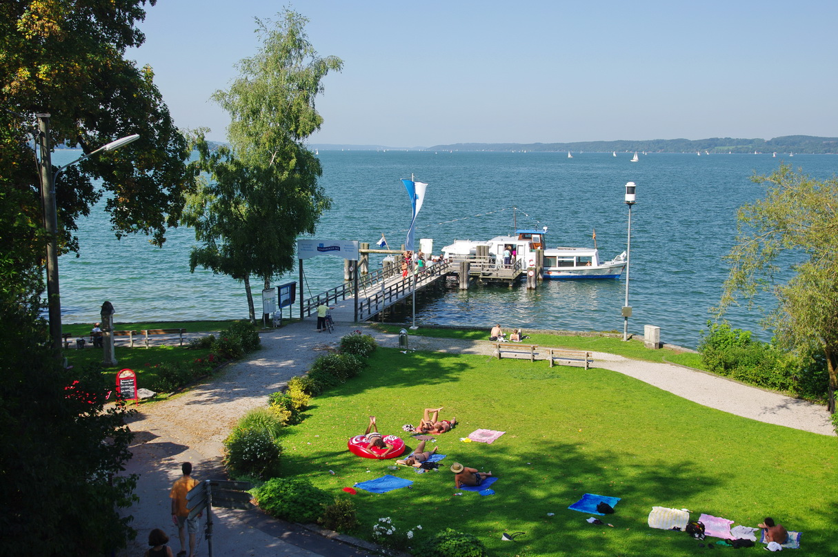 Dampferanlegestelle Seeshaupt im Sommer